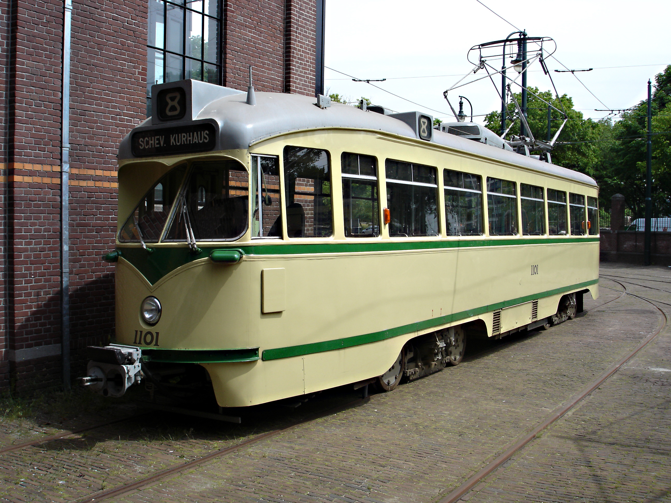 PCC in remise Frans Halsstraat, Den Haag